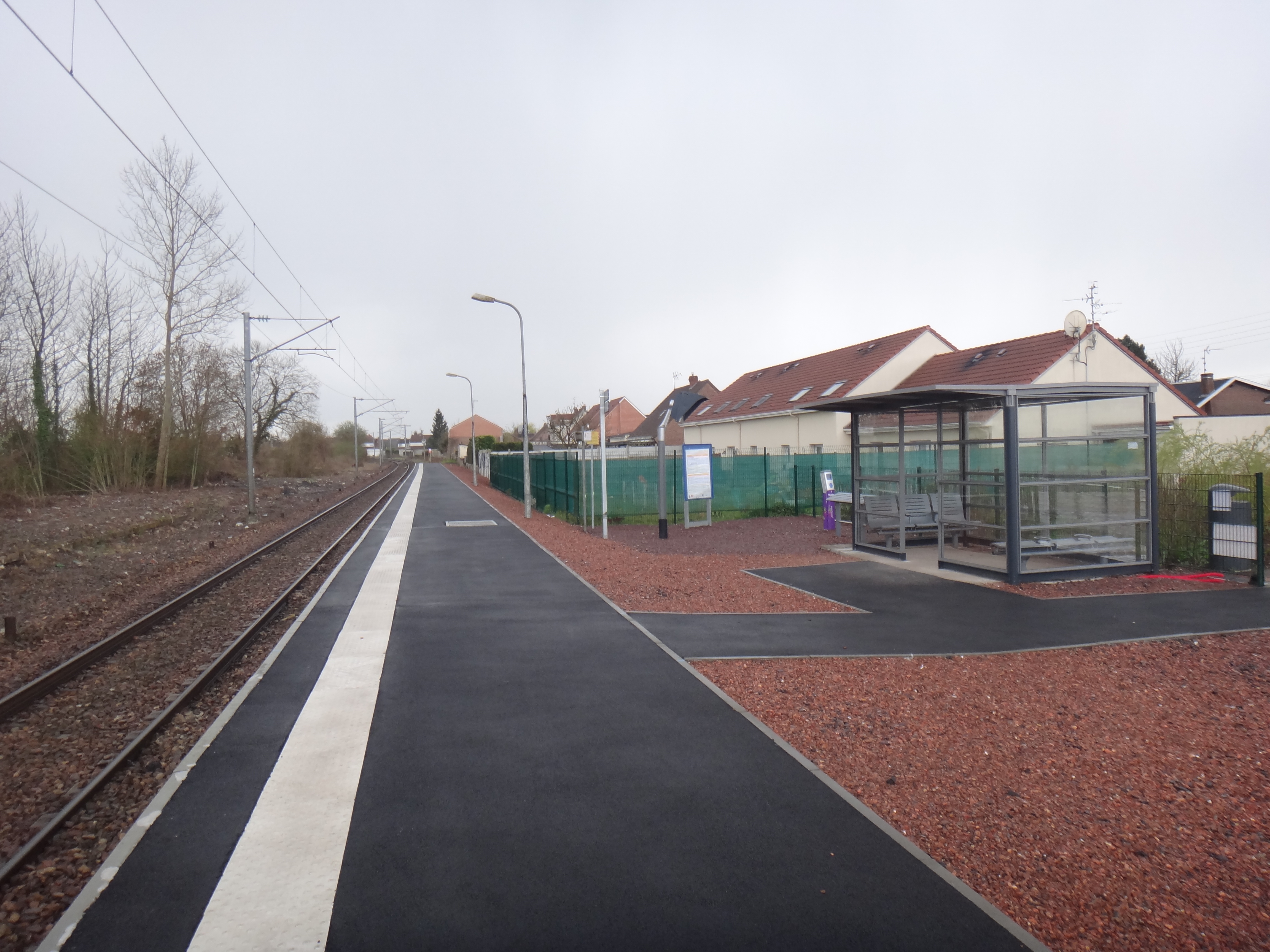 Gare de Arleux, Nord, France, en 2014